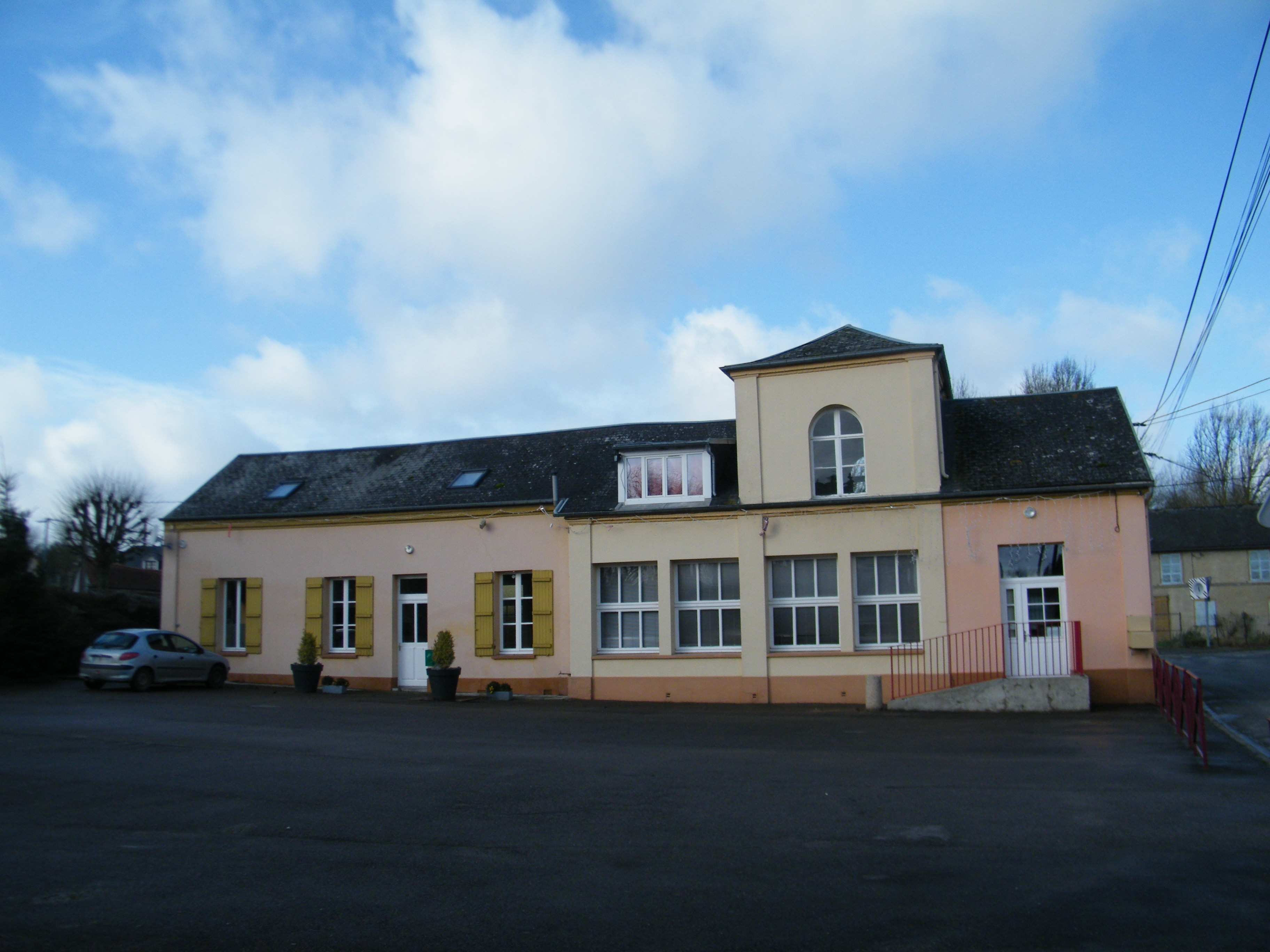 Vismes, Somme, Fr, mairie-école près de l'église.